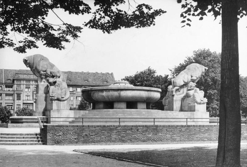 Berlin, Arnswalder Platz, Stier-Brunnen Berlin, Juni 1937. Auf dem Arnswalder Platz steht seit 1934 der von Hugo Lederer geschaffene Fruchtbarkeitsbrunnen, auch Stierbrunnen genannt; Im Hintergrund die Elbinger Straße (Dimitroffstr.). Juni 1937